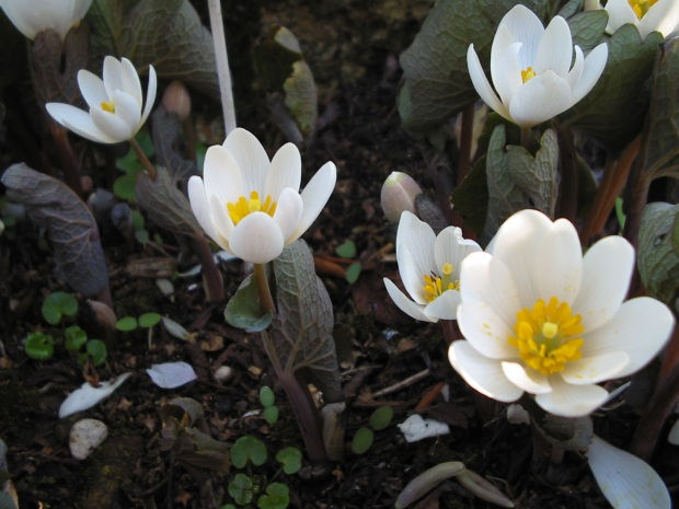 Sanguinaria canadensis, Jardin alpin, Jardin des Plantes de Paris